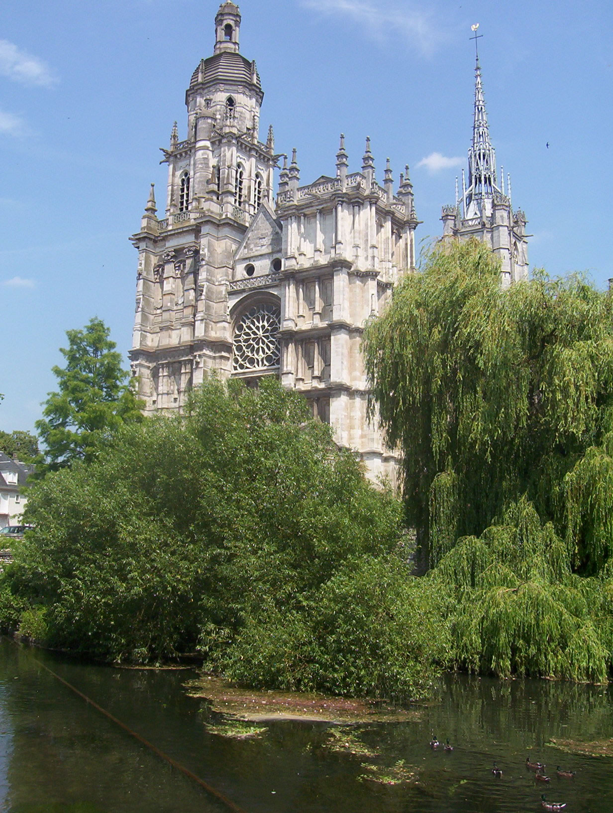 L'Iton, au pied de la cathédrale d'Évreux - France